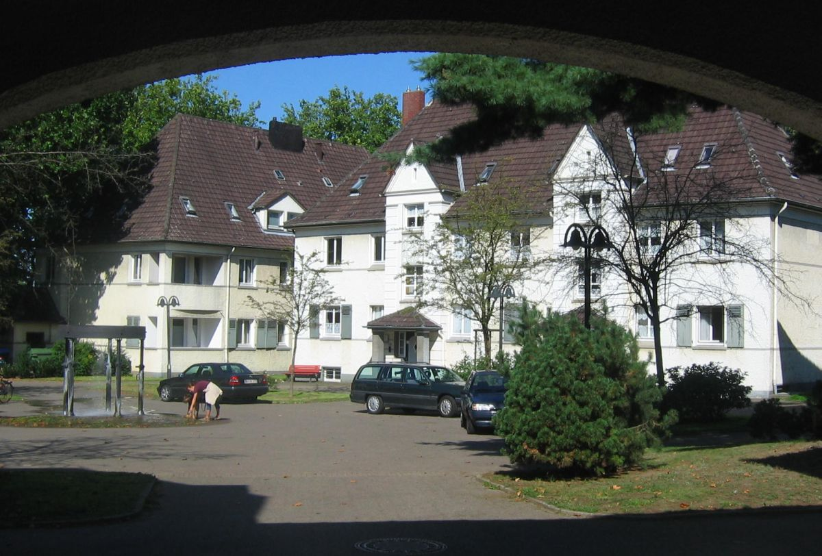 Bochum-Hordel, Dahlhauser Heide, Beamtenplatz eigenes Foto 05/2006